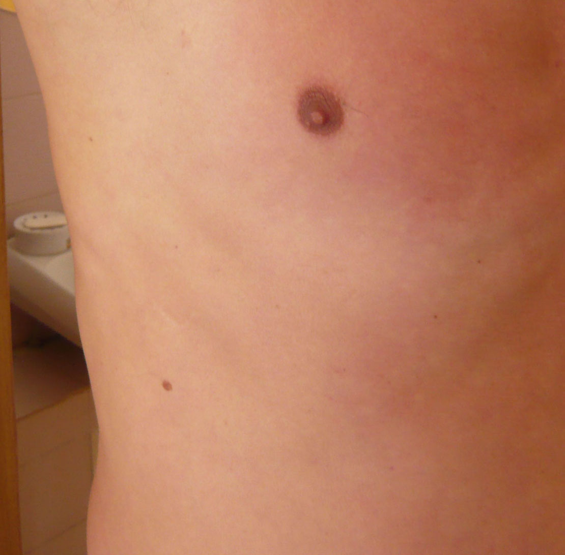 Межрёберная посттравматическая лёгочная грыжа - исчезновение в покое